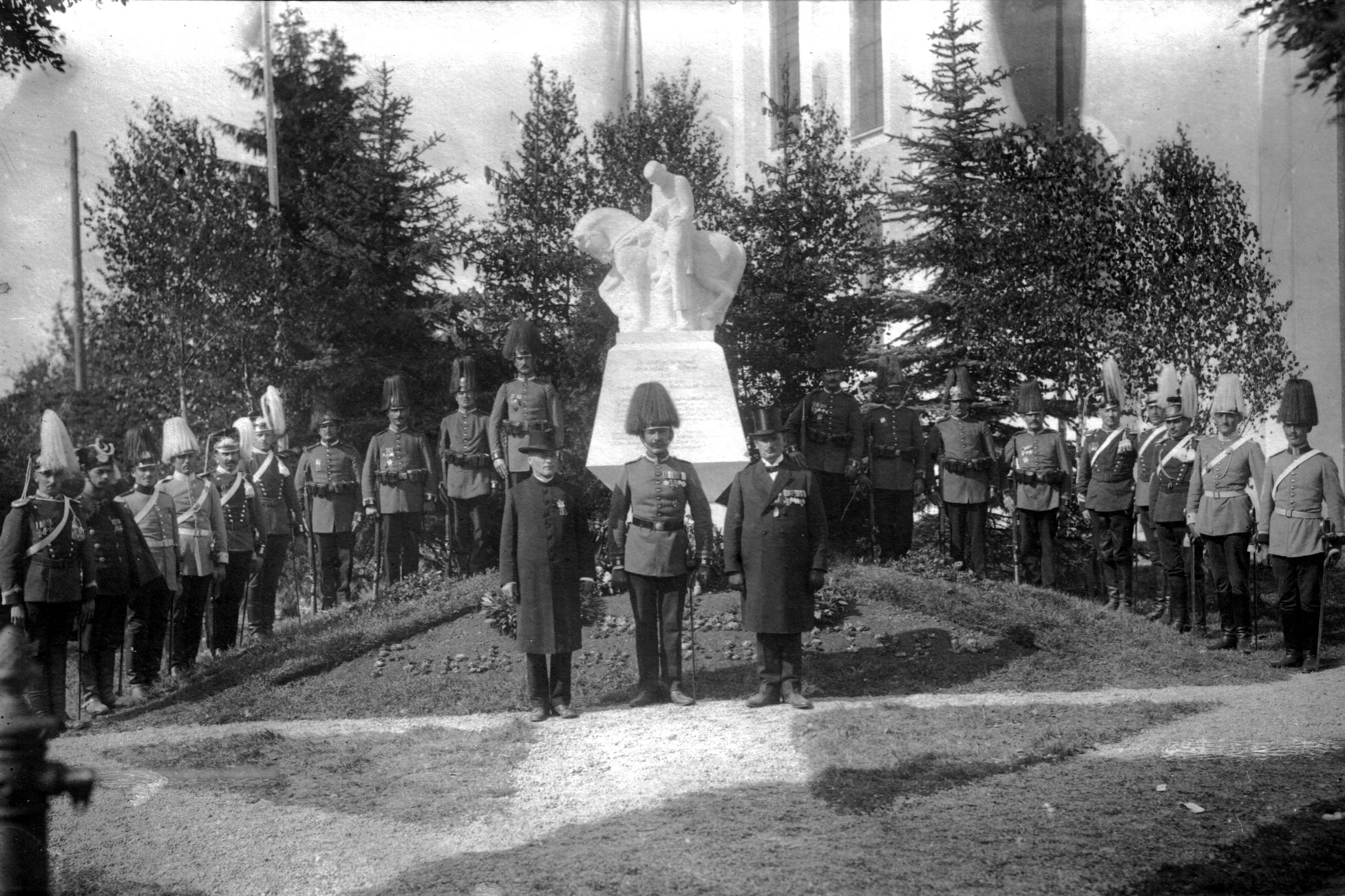 Kriegerdenkmal Tannheim (Württemberg)